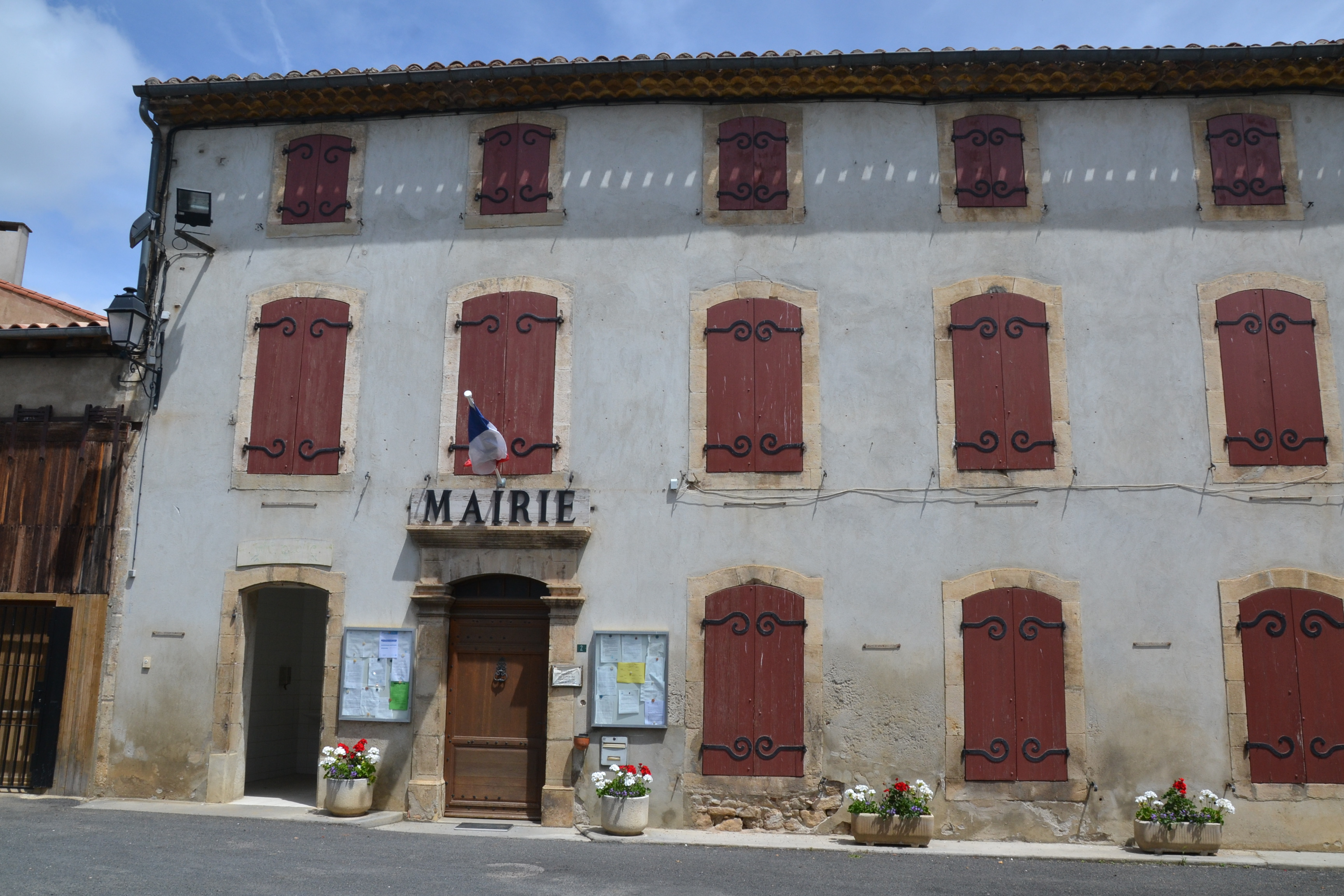 Mairie de Puivert (Aude, France).